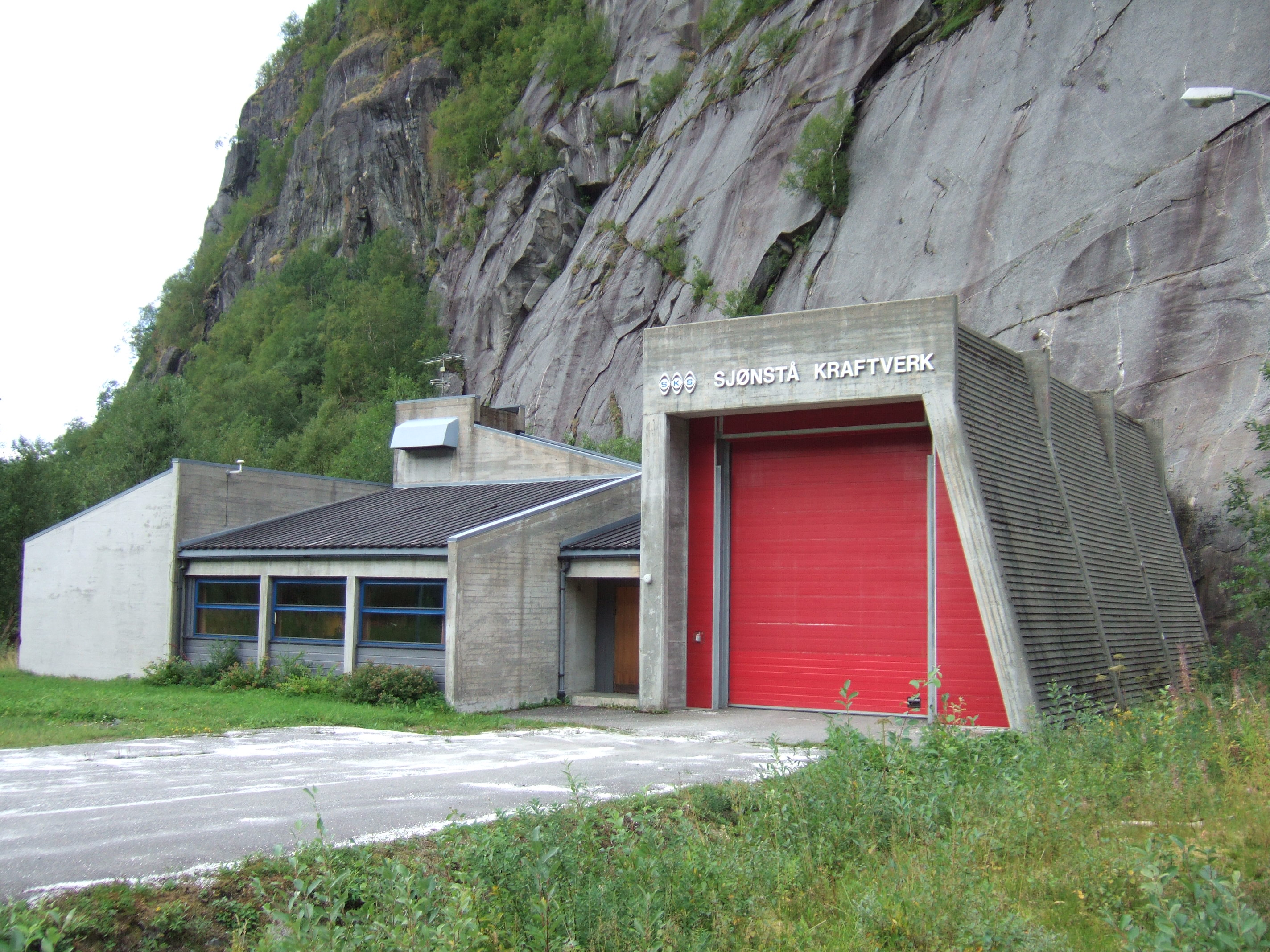 Sjønstå kraftverk i Fauske kommune i Nordland.